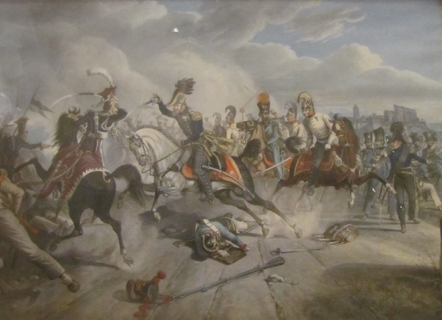 Der Überfall bei Cesenatico (Koalitionskriege), Gemälde im Heeresgeschichtlichen Museum in Wien